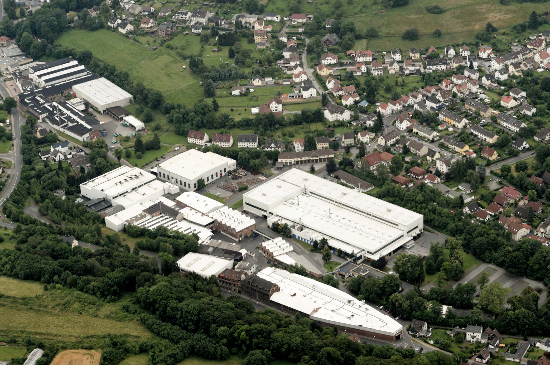 Fotoflug Sauerland Nord. Hemer, Sundwiger Messingwerk, Landesstraße 682, Blickrichtung Süd The making of this document was supported by the Community-Budget of Wikimedia Germany.